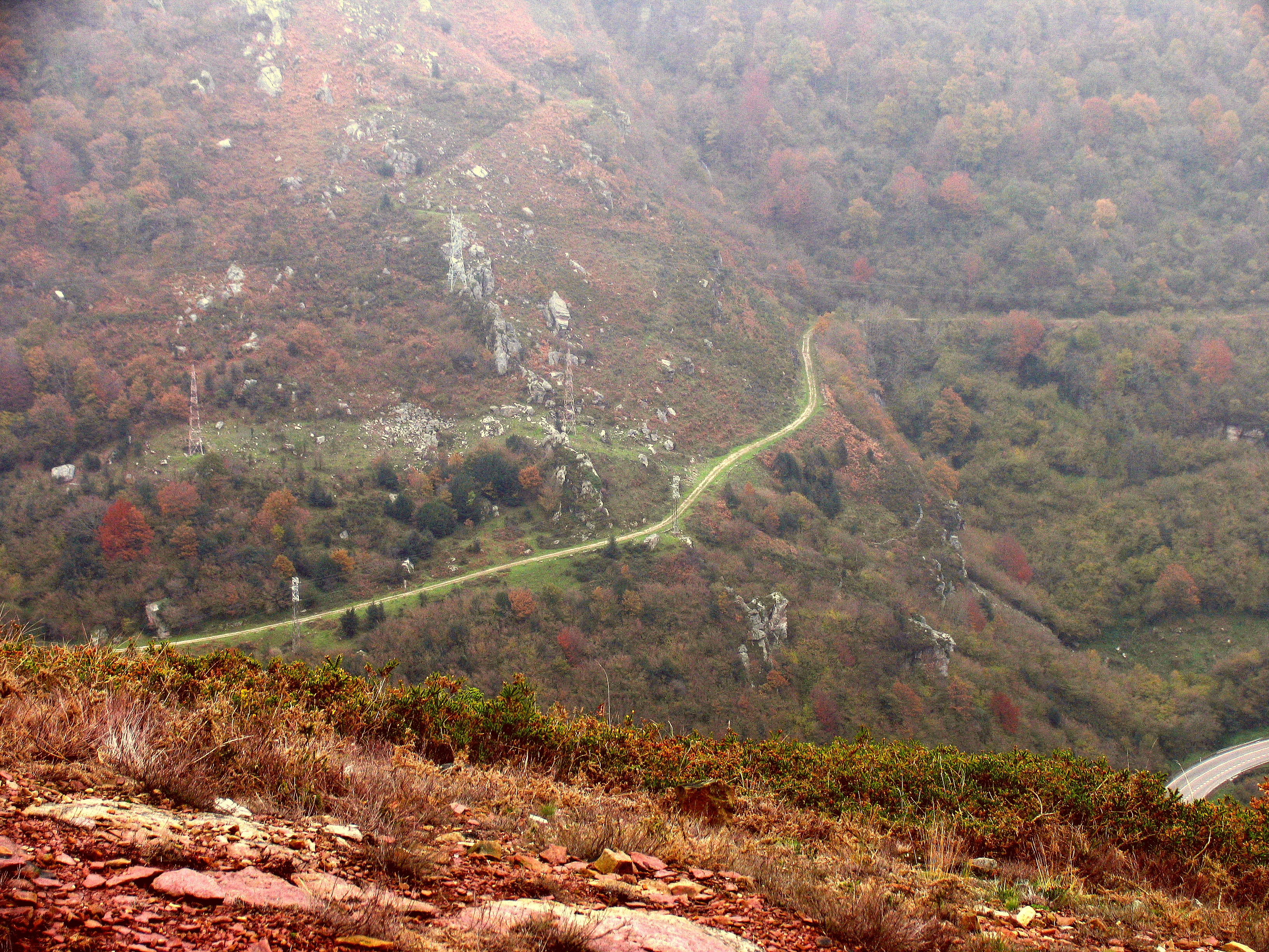 Camino Real de Las HocesTramo del camino en el municipio de Bárcena de Pie de Concha. Coordenadas del punto de toma de la vista: Latitud 43.101484° , Longitud -4.066911°